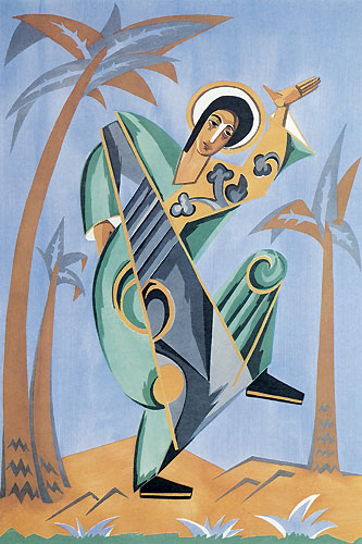 Н.С. Гончарова. Эскиз костюма Св. Иоанна к балету . 1915.